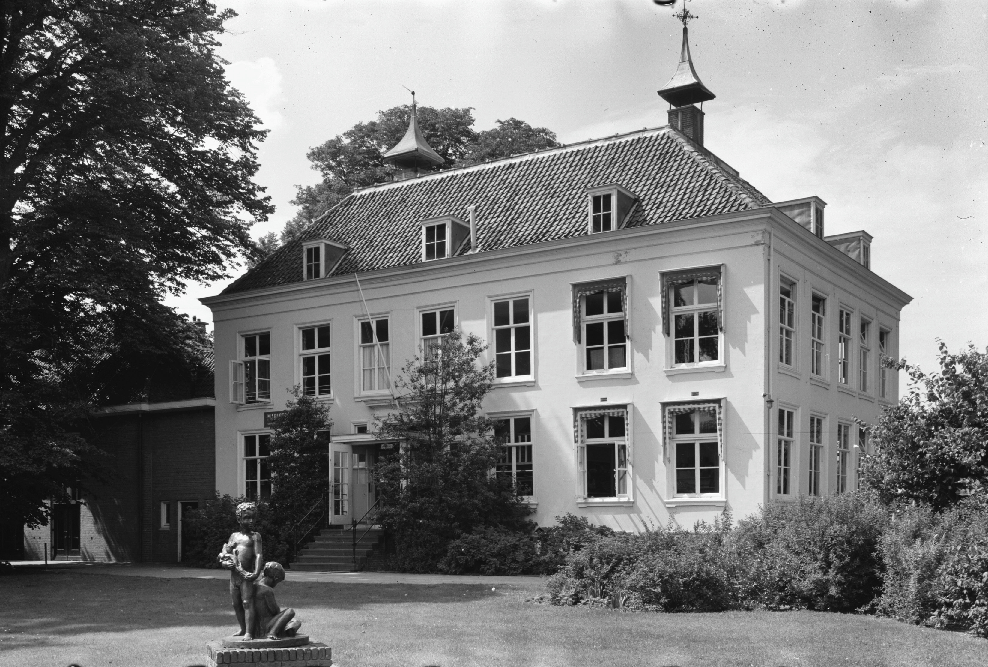 Marlot: Leidsestraatweg 77